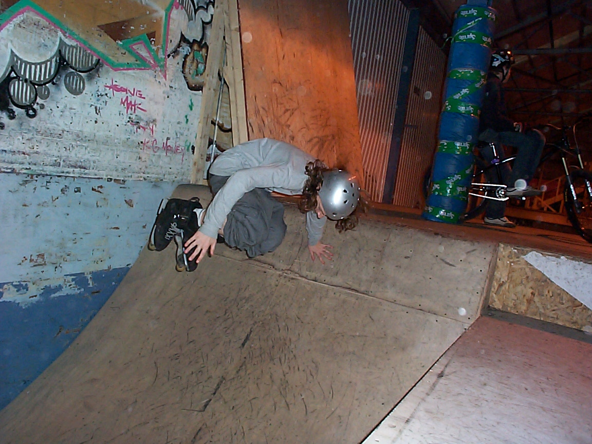 Skating